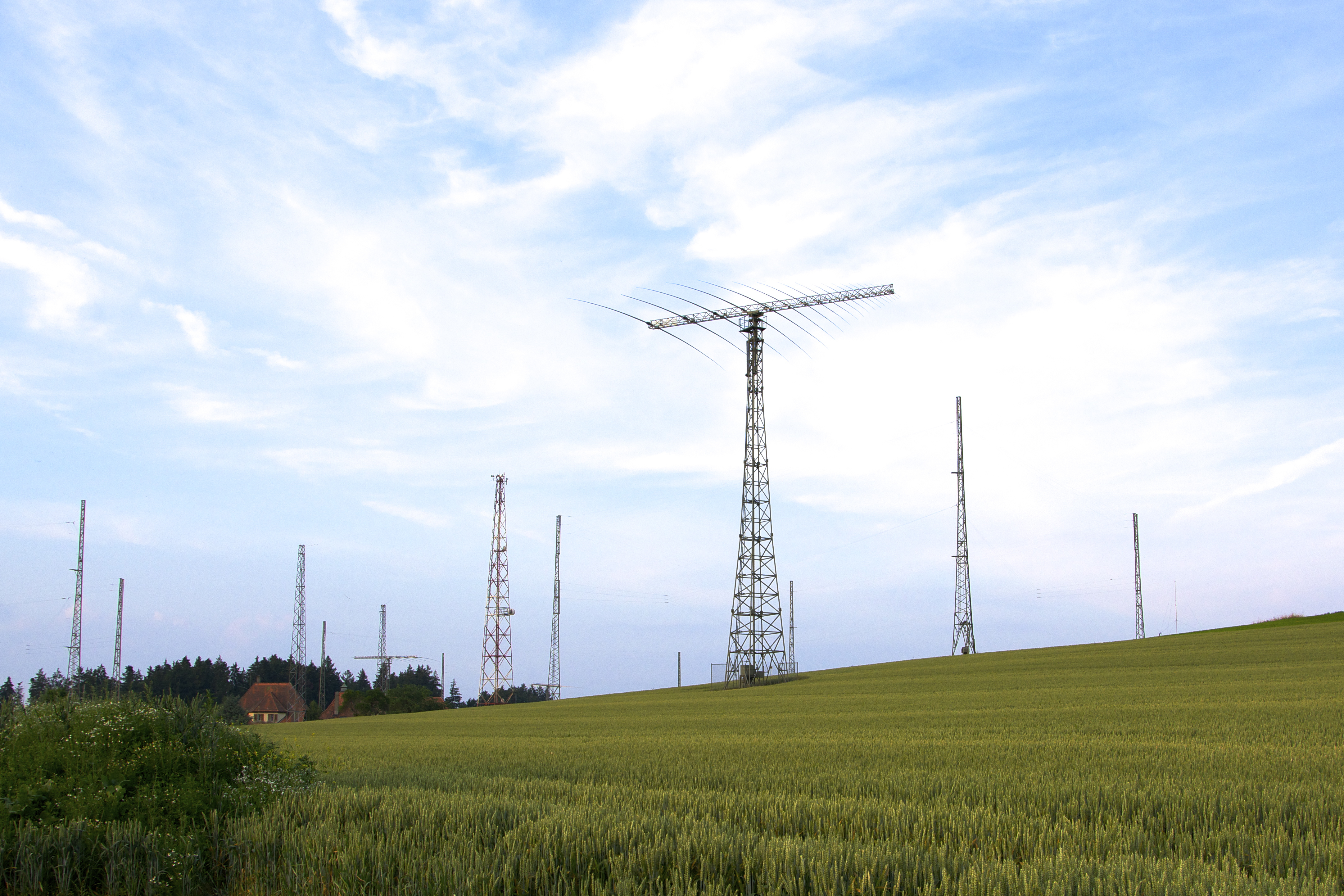 Bernradio (Rufzeichen HEB) ist die weltweit tätige Küstenfunkstelle der Schweiz. Sie ist die einzige Küstenfunkstelle der Welt, die von einem Binnenstaat betrieben wird. Seefunk wird in der Schweiz seit 1941 betrieben. Seit dem 1. Januar 2009 wird Bernradio im Auftrag der Schweizerischen Eidgenossenschaft von der Swisscom Broadcast AG betrieben.